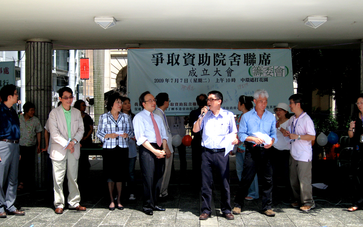 中文（香港）: 2009年7月7日一眾立法會議員出席「爭取資助院舍聯席」成立大會